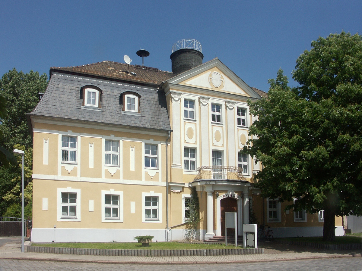 Das Rathaus von Kitzen im ehemaligen Herrenhaus